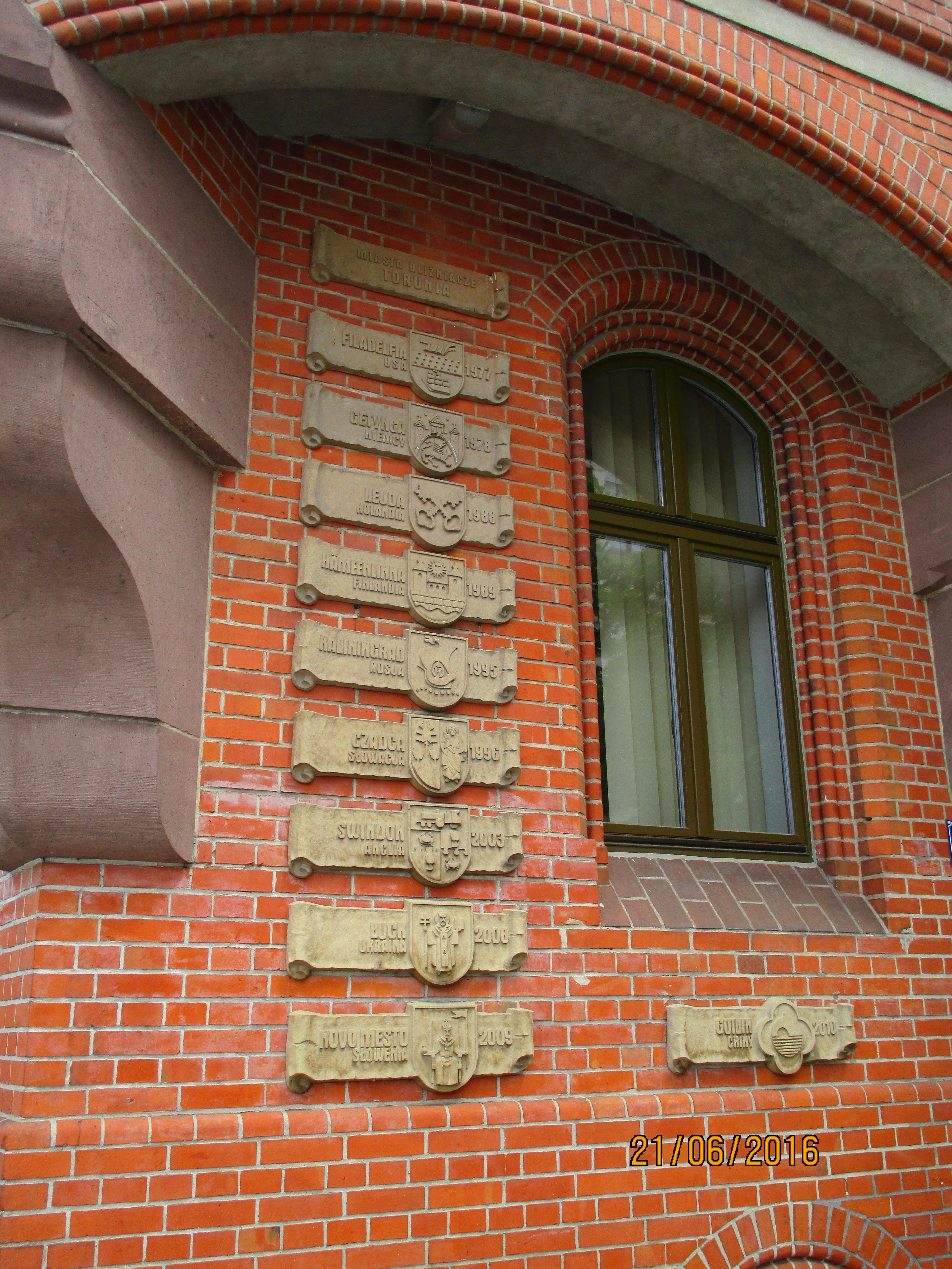 Plaketten der Partnerstädte am Verwaltungsgebäude Torun